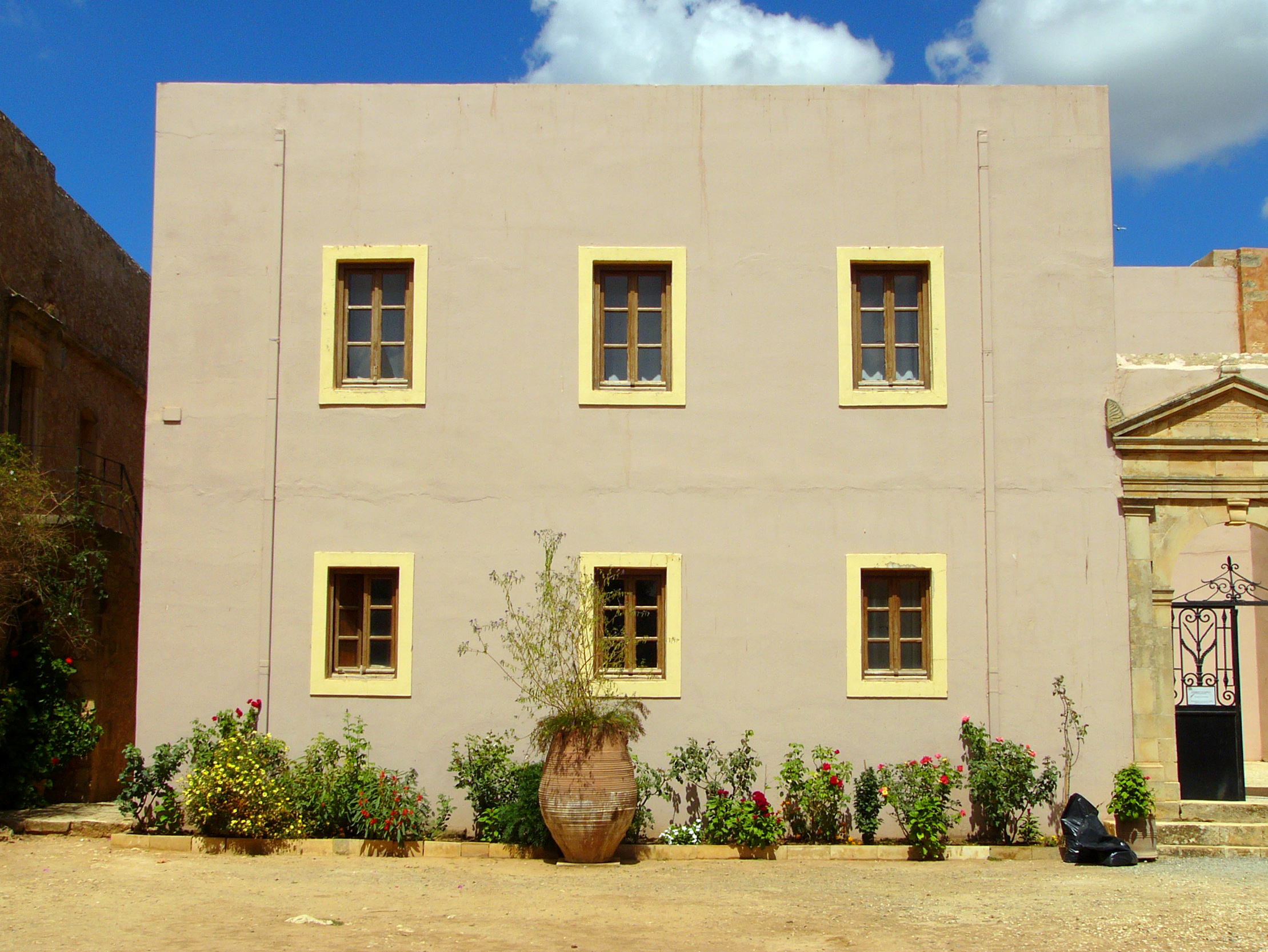 Hospice du monastère d'Arkadi (Crète, Grèce)